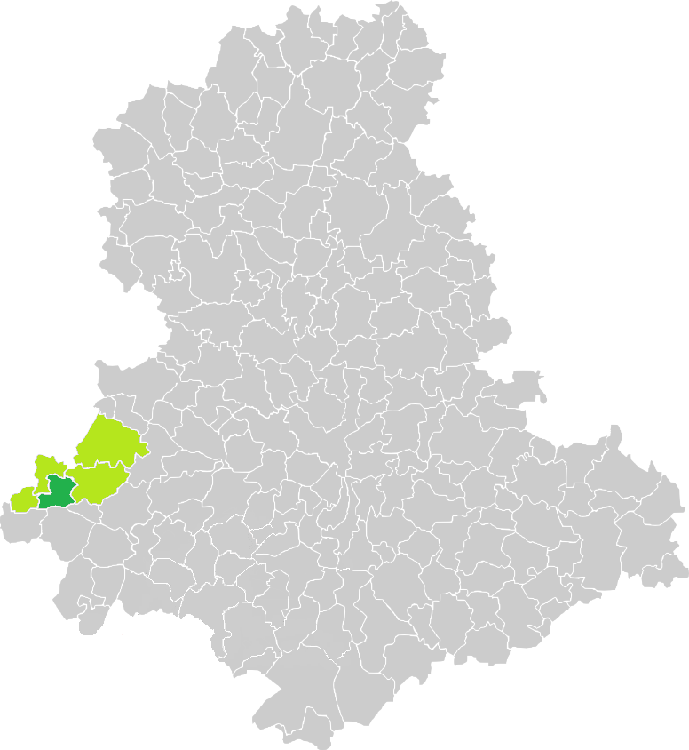 Carte de situation de la commune de Chéronnac (en vert foncé) dans le votre Canton (en vert clair) sur une carte des communes de la Haute-Vienne